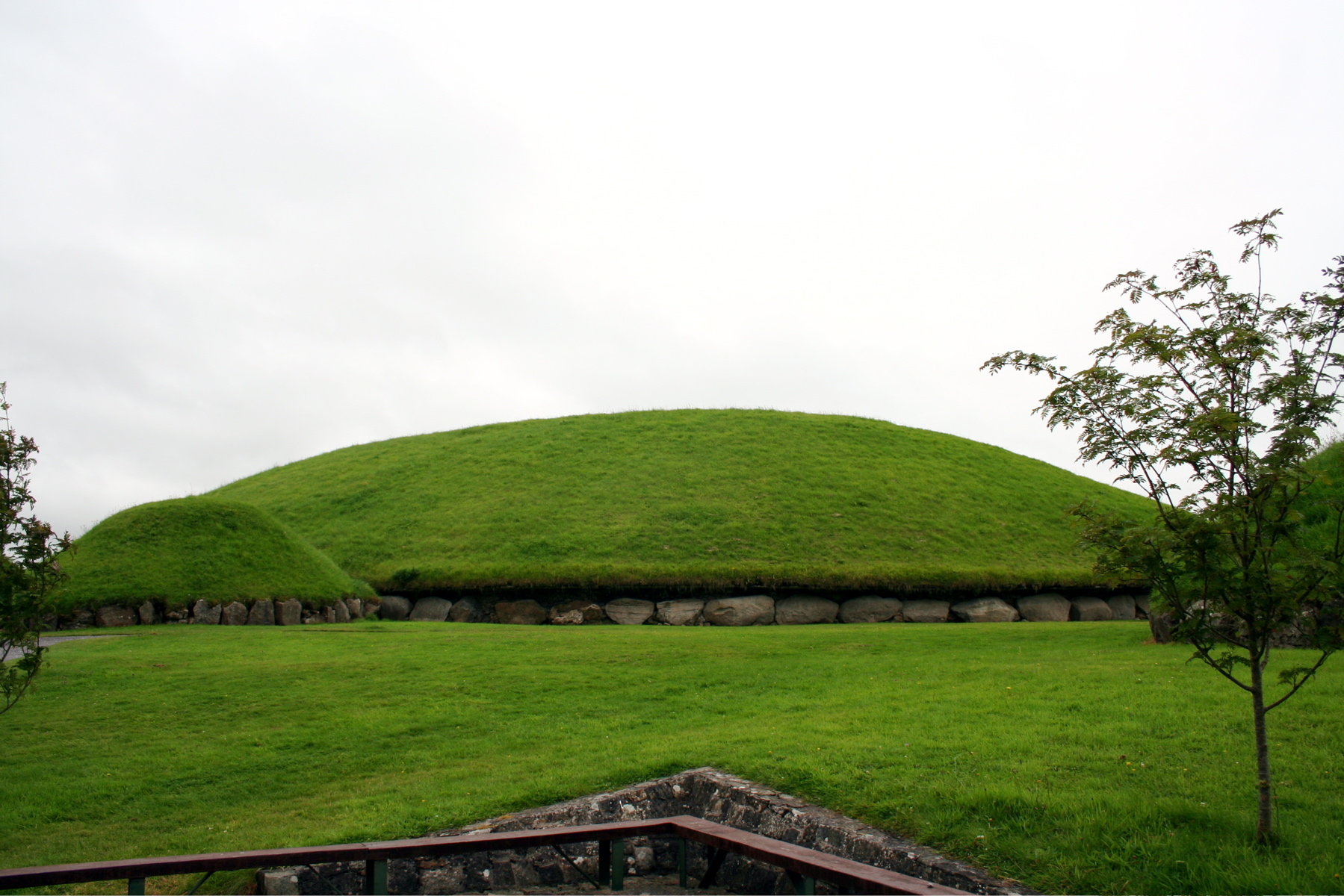 Yacimiento arqueológico de Knowth